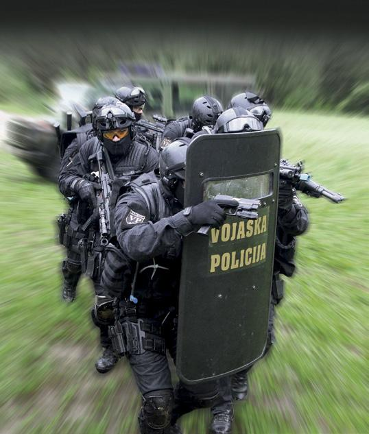 Pripadniki Vojaške policije